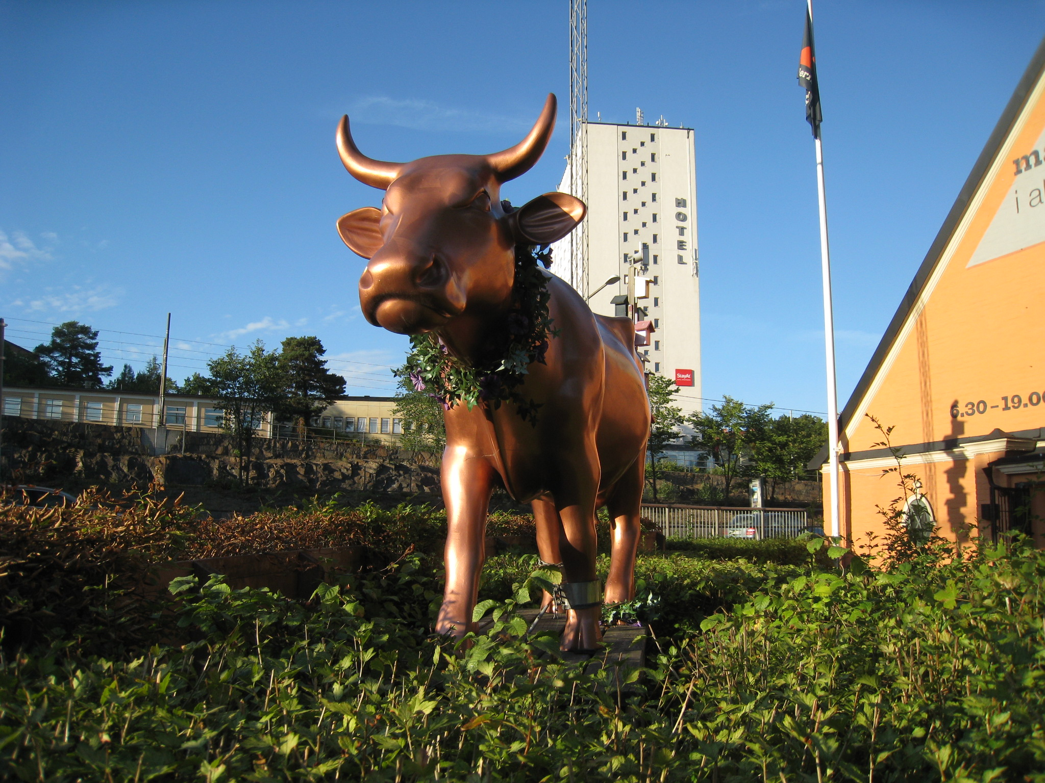 Kossan Dottie står utanför Alviks Måleributik AB (f.d. biografen Bromma-Teatern), Gustavslundsvägen 174 i Alvik, Bromma. Kon är gjord av arkitekten Thomas Sandell (född 1959) till The CowParade i Stockholm 2004. Den inköptes efter utställningen av målade kor runt stan på auktion till förmån för BRIS. År 2014 ändrades kulören, efter Sandells medgivande, från vit till den nuvarande kopparfärgen genom Alviks måleributik.